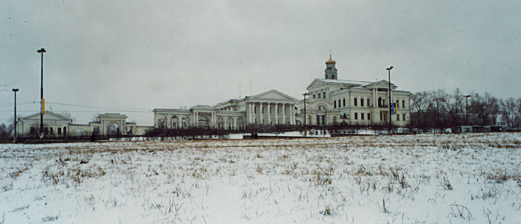 Kharitonov palace (Yekaterinburg)